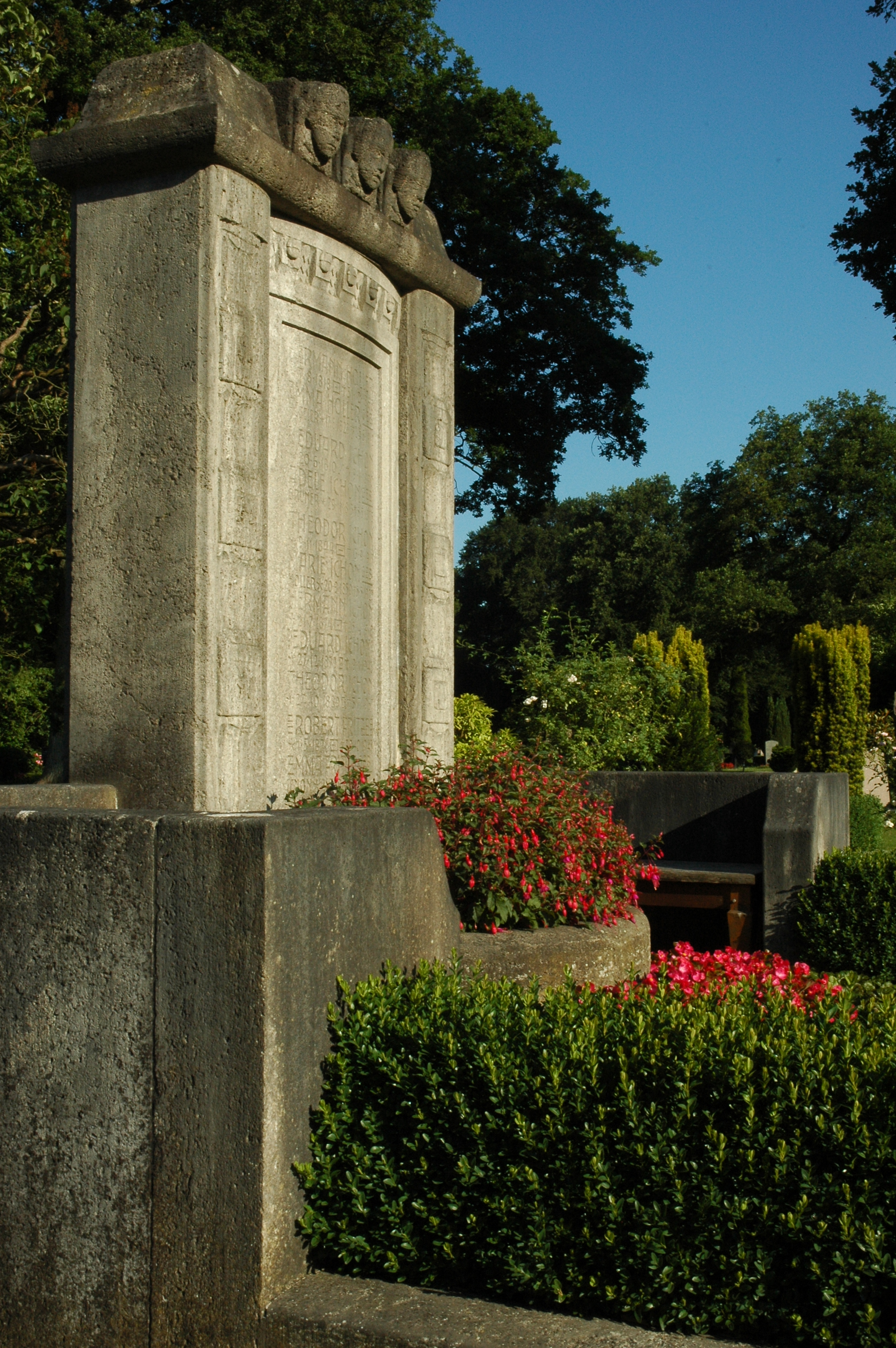 Grabmal Holler-Ichon auf dem Riensberger Friedhof Bremen